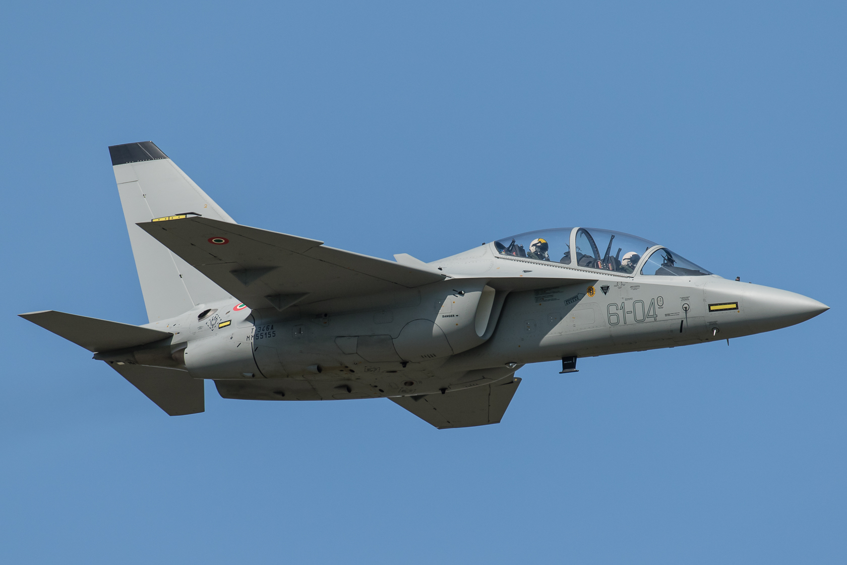 Alenia Aermacchi T-346A Master MM55155 61-04 formazione legend